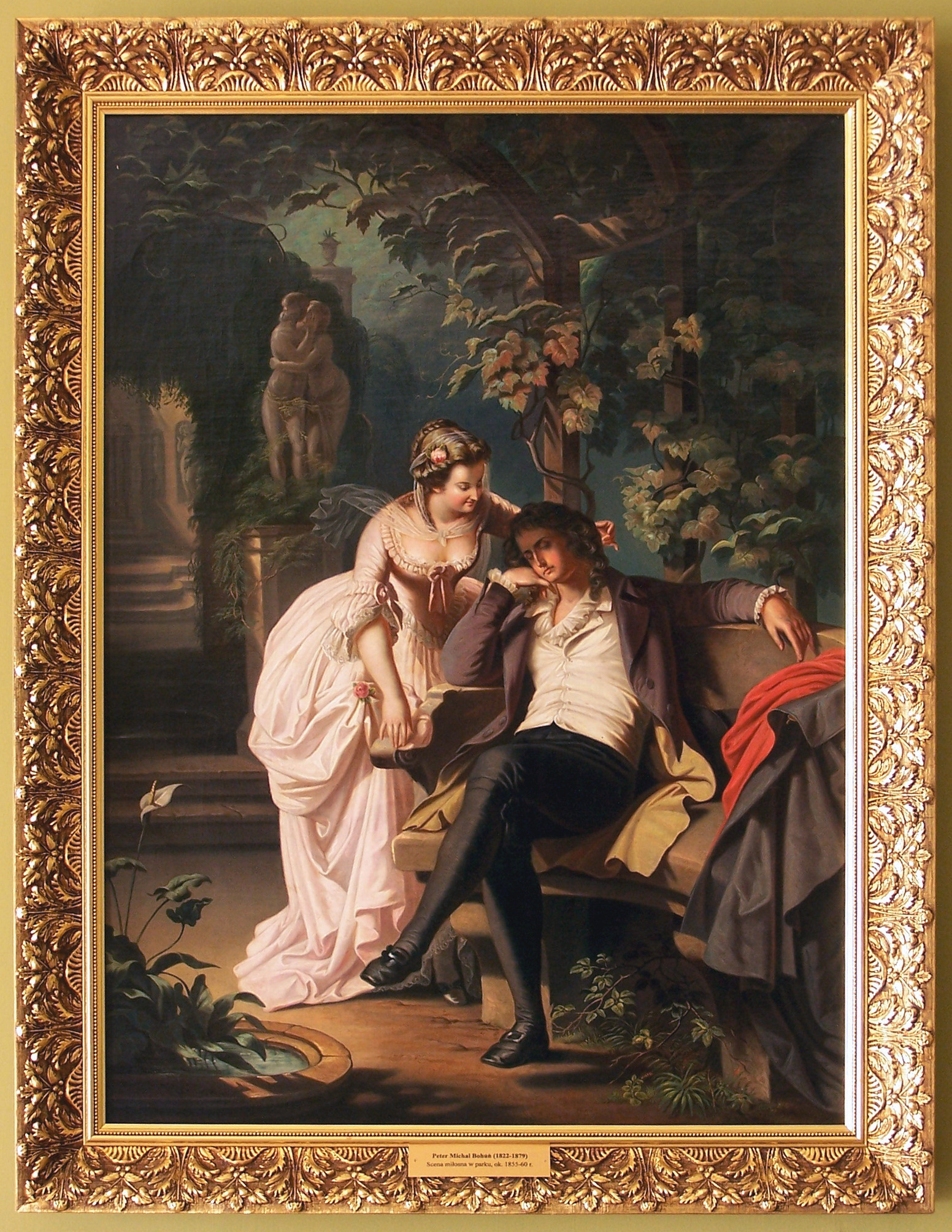 Znajdujący się w bogatej galerii malarstwa w muzeum na Zamku książąt Sułkowskich w Bielsku-Białej.